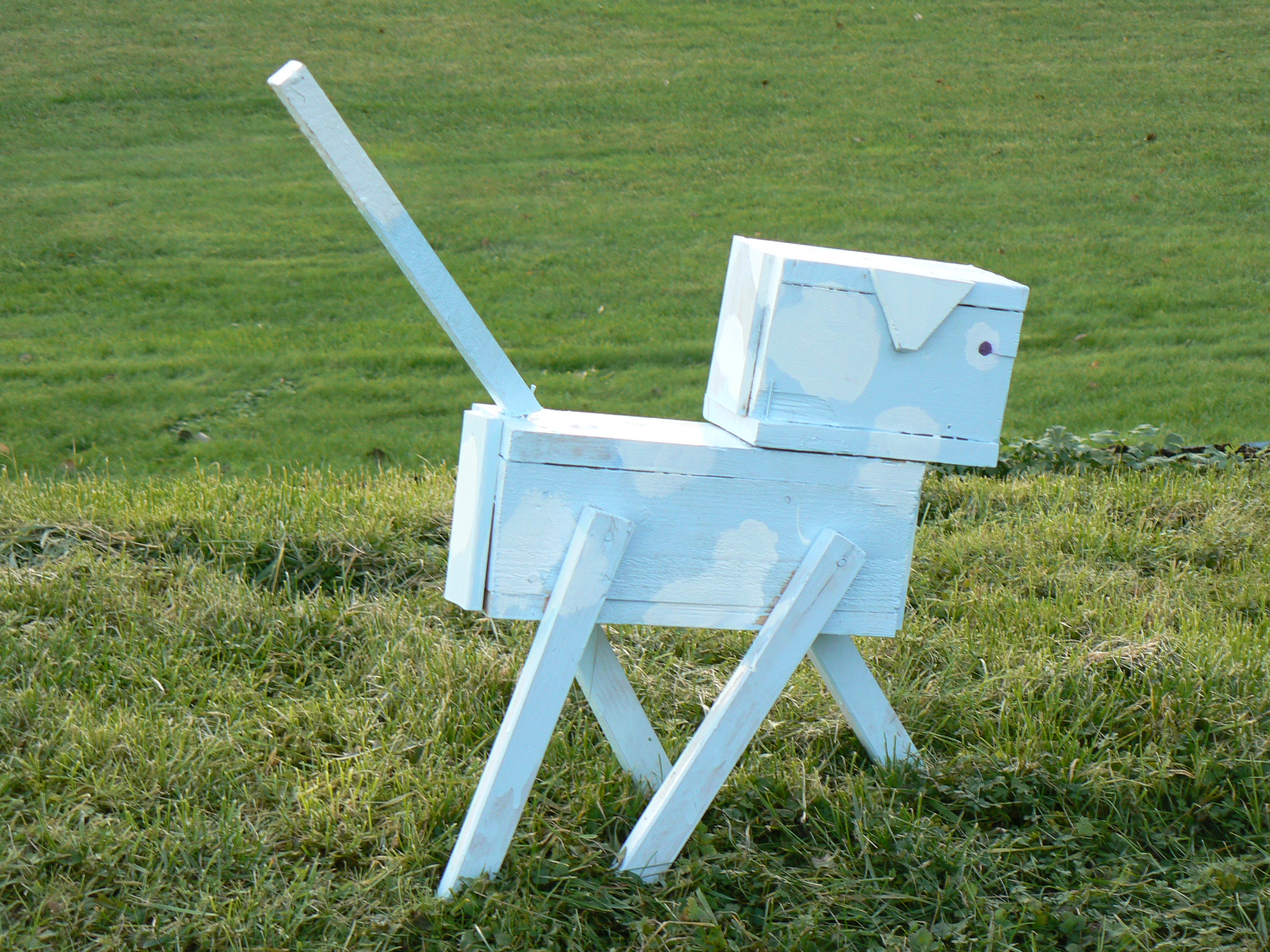 Rondellhund i Vallarondellen i Linköping 2006-11-09. Foto av Skvattram